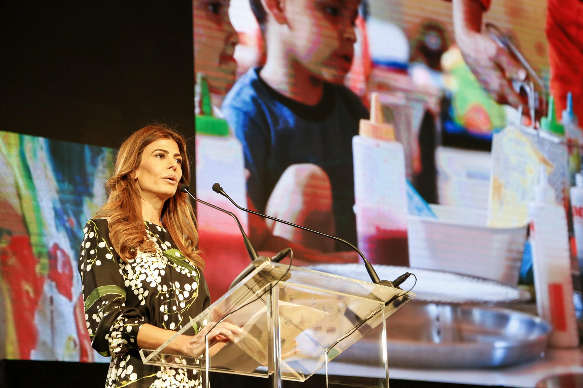 Juliana Awada: “El cuidado de la primera infancia es la mejor manera de construir futuro”